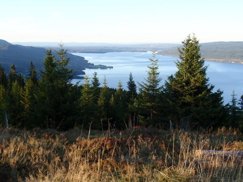 Utsikt fra toppen av Årneskollen